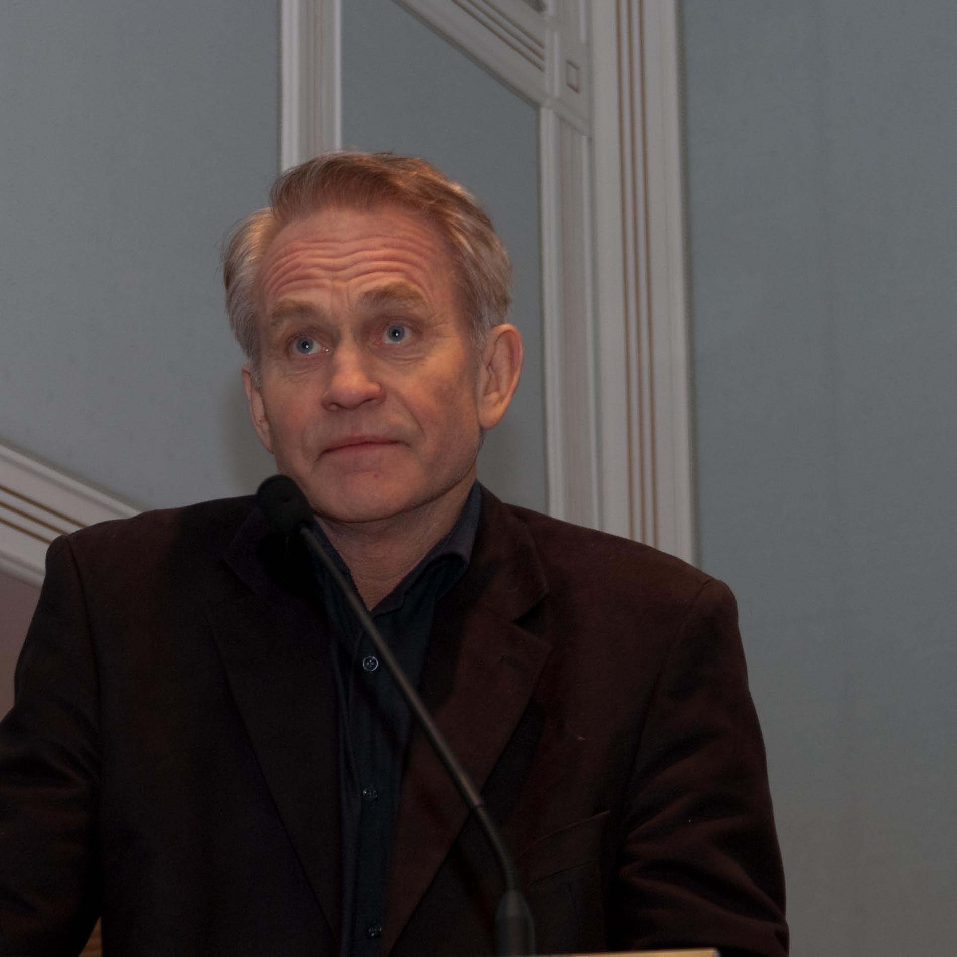 Sven Ole Fagernæs (født 12. mars 1945) er Norges regjeringsadvokat.